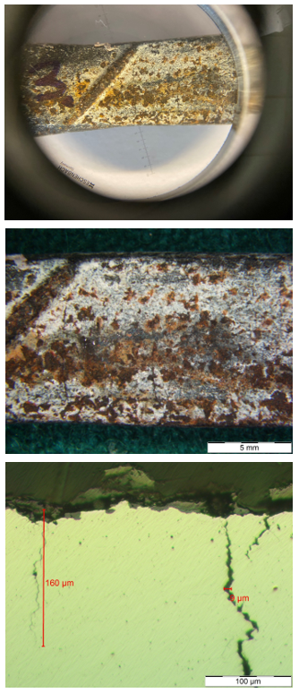 Spannungsrisskorrosion an Spannstahl. Entnommener Spannstahl einer Brücke mikroskopisch dargestellt in mehreren Vergrößerungsstufen. Sowie Anschliffbild.